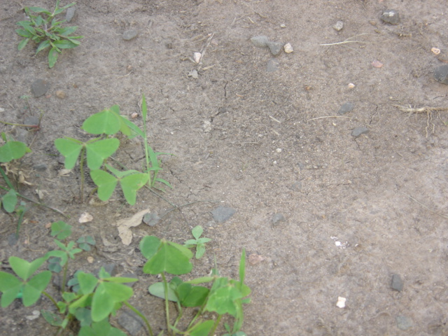 Descrição Solo de Canoas.